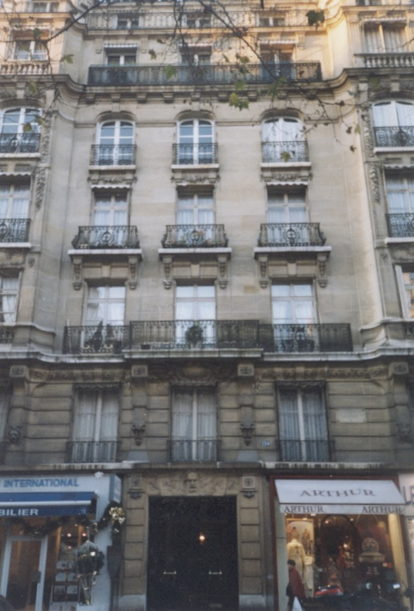 Paris, Wohnhaus 124 avenue Victor Hugo, 16. Arrondissement